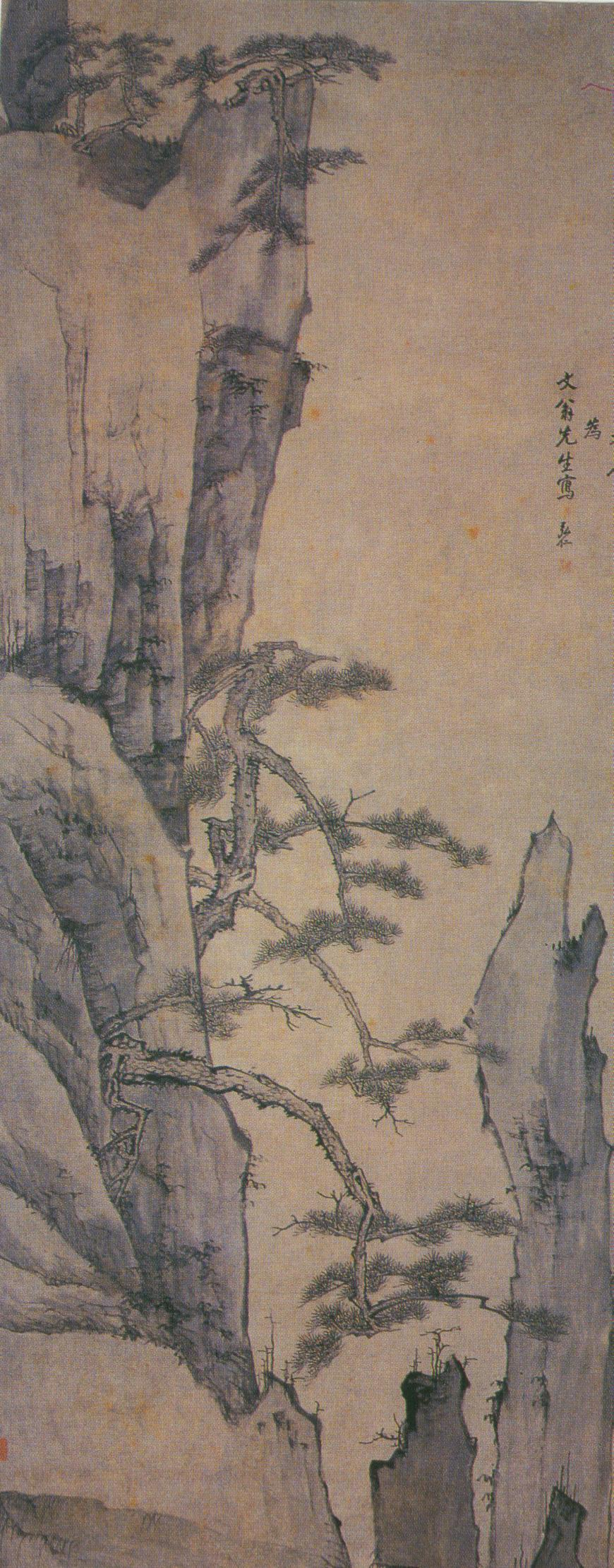 黄海树石 清·渐江